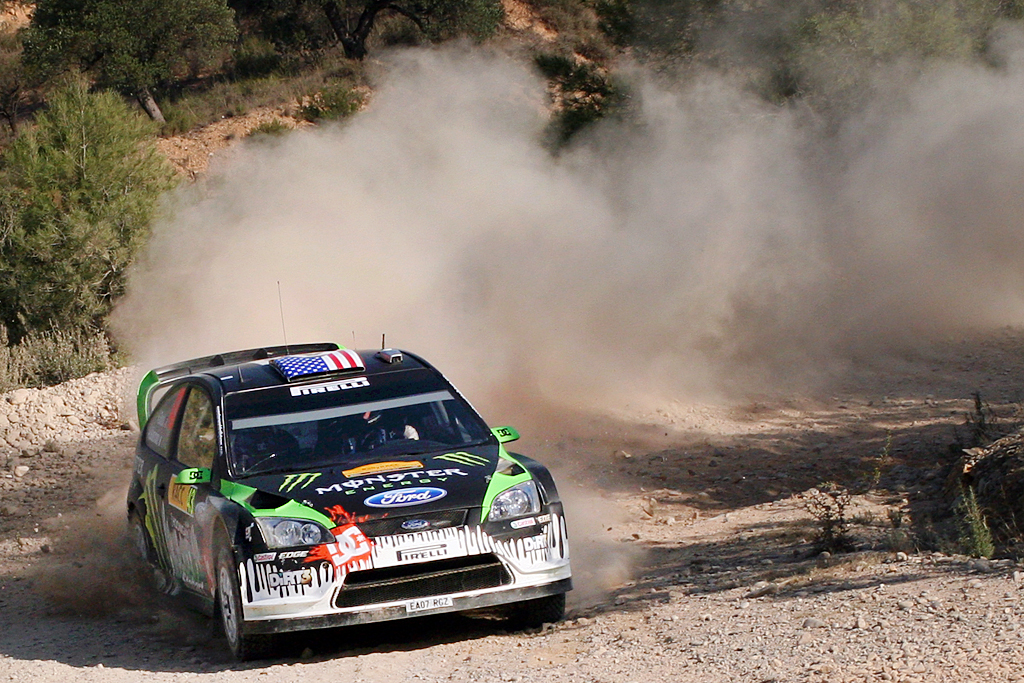 Block-Gelsomino Catanlunya 2010